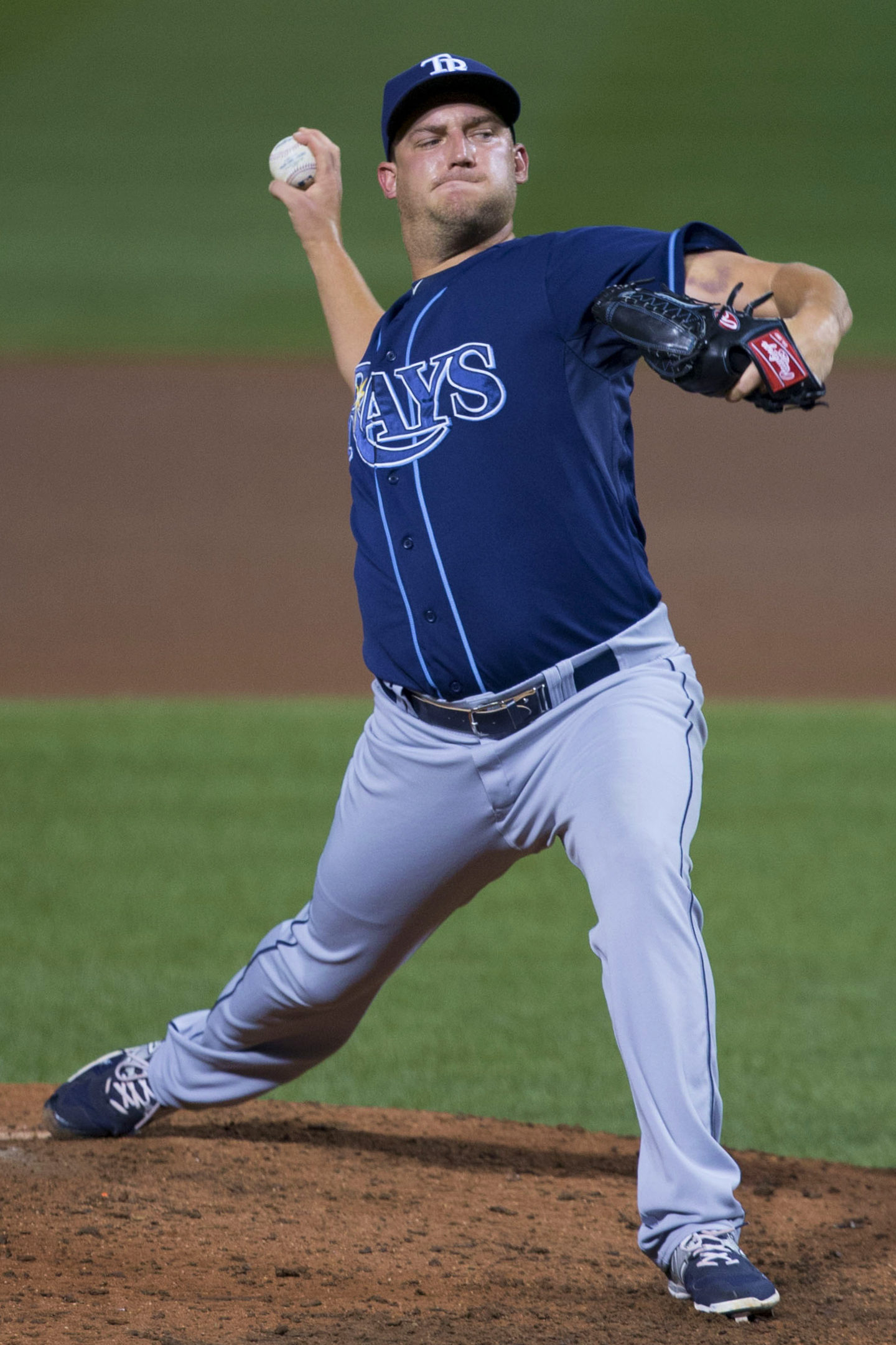 Matt Andriese